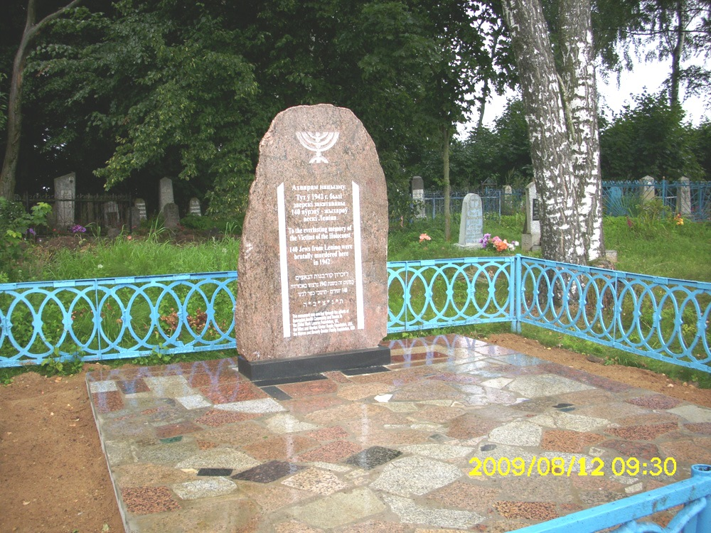 Новый памятник евреям деревни Ленино (Романово) Слуцкого района Минской области, убитым во время Холокоста.